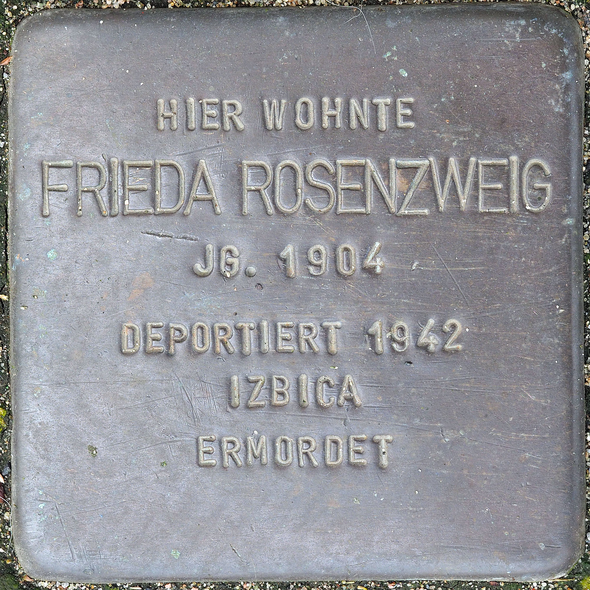 Stolpersteine MG: Rosenzweig, Frieda